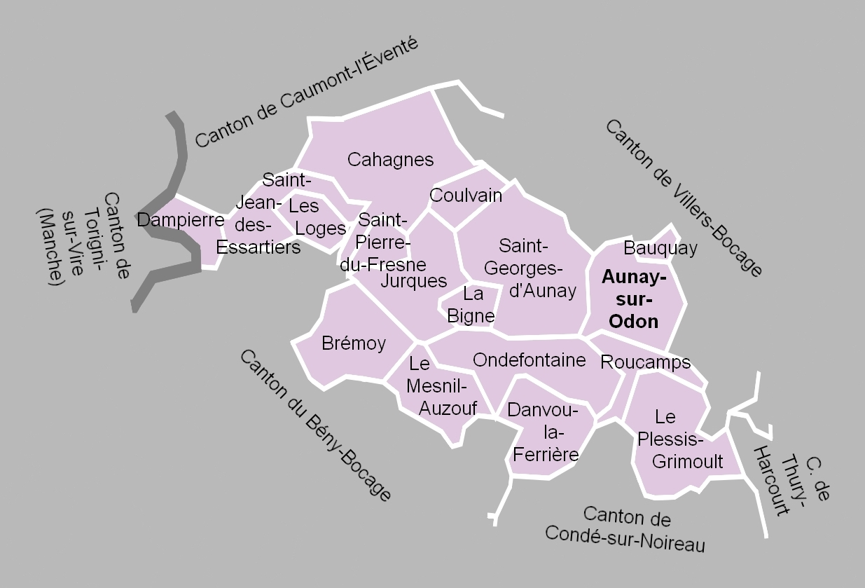 Carte du canton d'Aunay-sur-Odon en 2012.